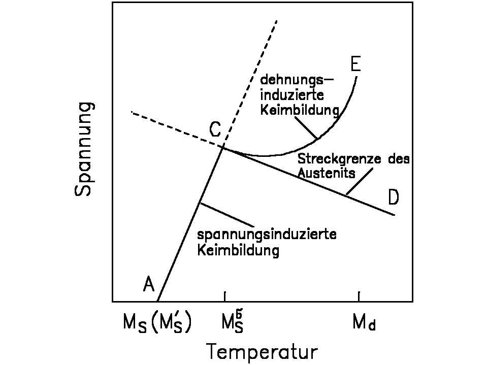 Temperaturabhängigkeit der spannungs- und verformungs­induzierten Marten­sit­bildung